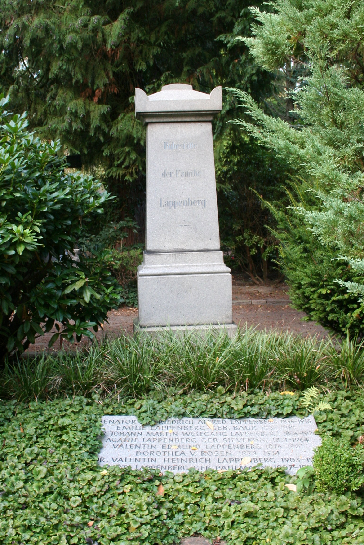 Familiengrab Lappenberg auf dem Nienstedtener Friedhof